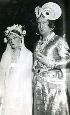 Kalidásza: Sakuntala. Társulat: Nemzeti Színház, Budapest. Bemutató: 1933.12.15. Rendező: Horváth Árpád. Szereplők: Színésznő / Sakuntala: Bajor Gizi, Duzsjanta, India királya: Abonyi Géza.